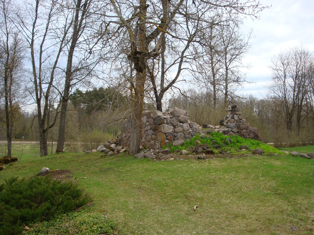 Linnusekünkal oleva maakividest hoone varemed.